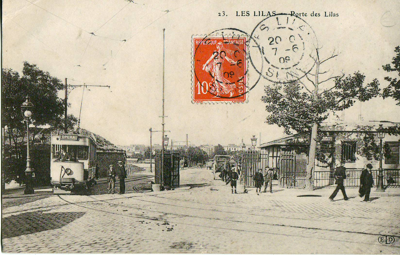 Carte postale ancienne éditée par ELD, N°23 LES LILAS : Porte des Lilas